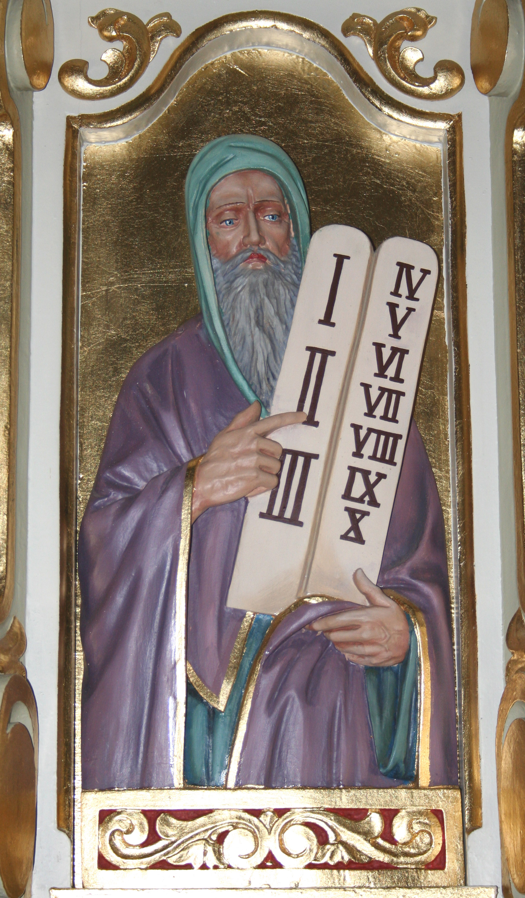 Wizerunek_Mojżesza_w_kościele w Niedobczycach.